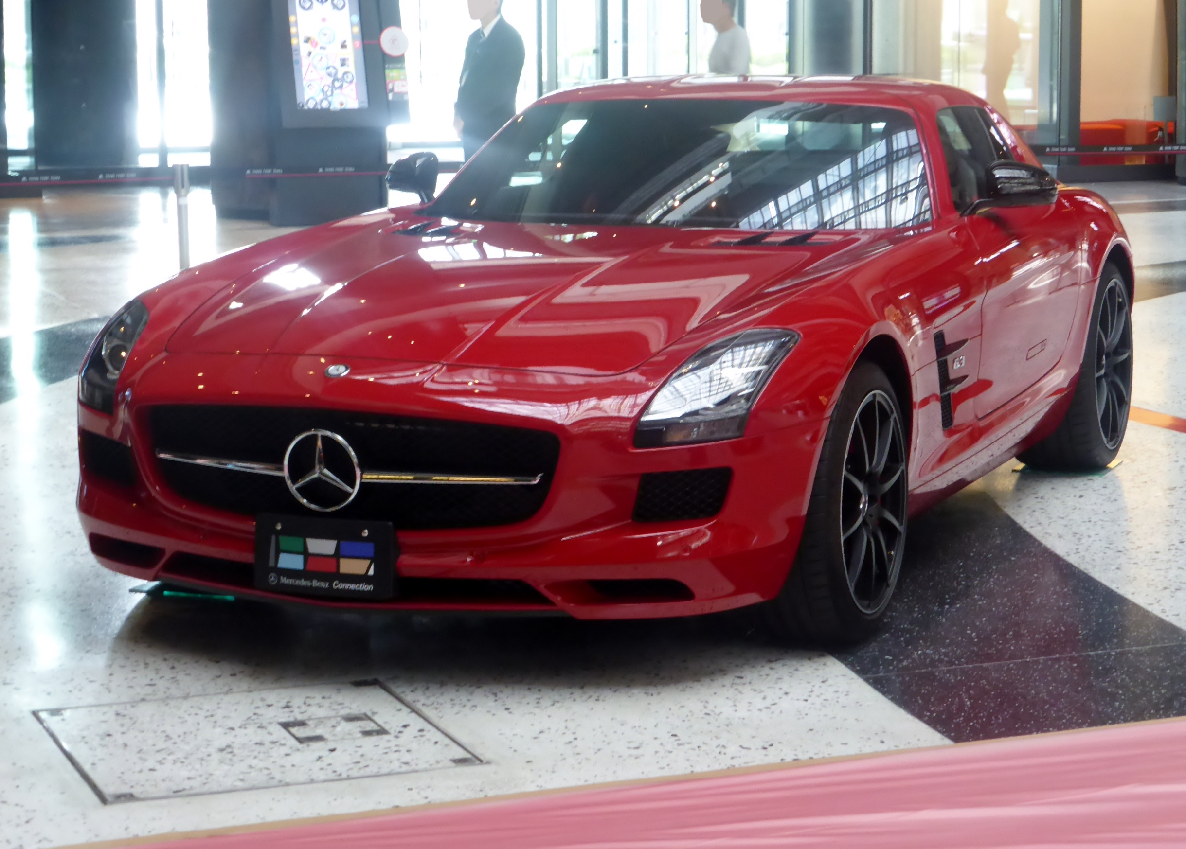 メルセデス・ベンツSLS AMG GTをフロントから撮影。